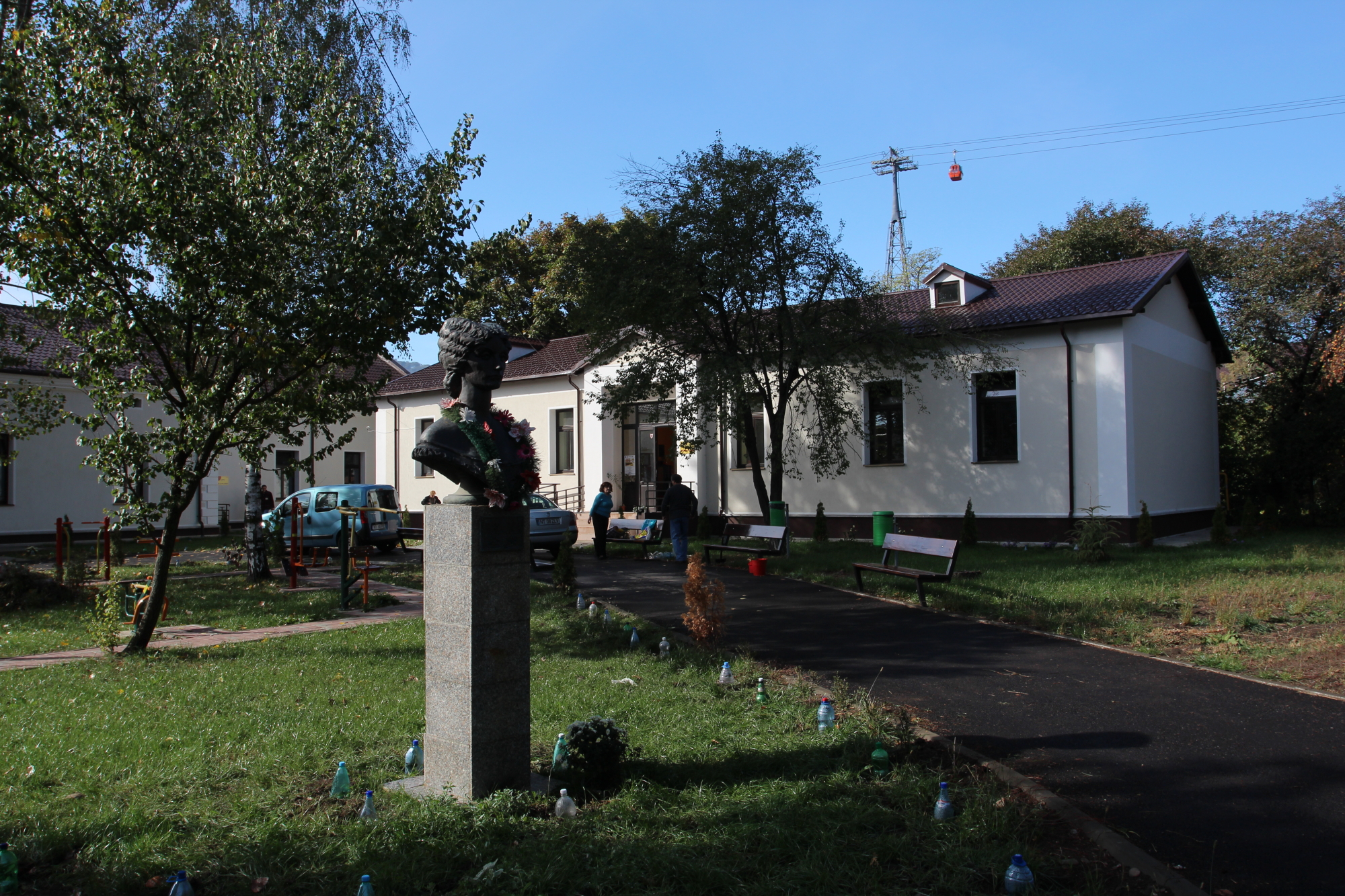 Spital, azi fundația "Îngrijiri Comunitare"